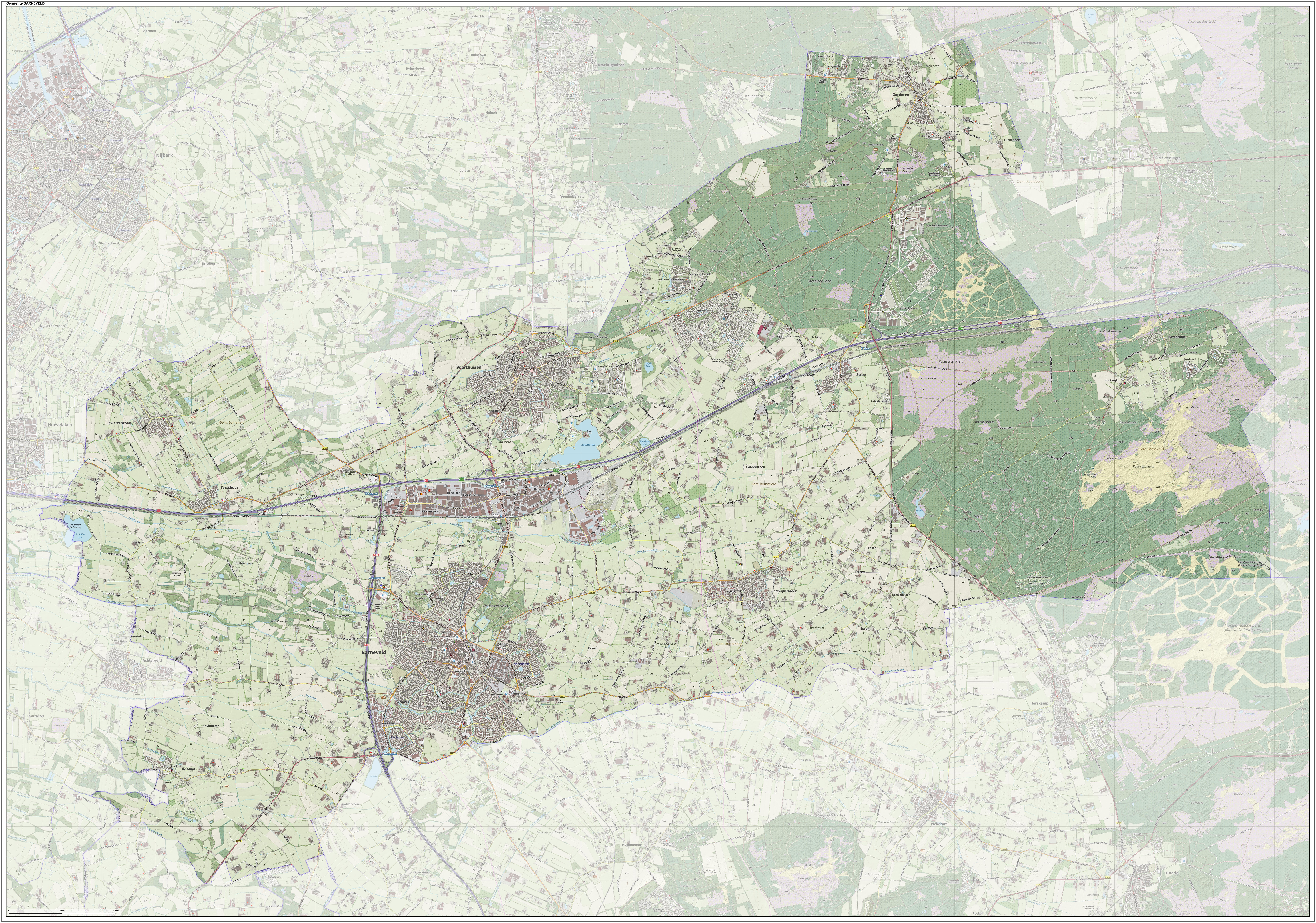 Topografische gemeentekaart. Resolutie: 400 pixels/km. Kaartbeeld samengesteld uit de open geodata van de Top10NL en Top25namen (Kadaster), Creative Commons-BY licentie. Gebouwvlakken uit open geodata BAG extract. Wegen uit de OpenStreetMap, OpenStreetMap community. Reliëfschaduw uit de Actuele Hoogtekaart AHN2. Samenstelling en kleurenschema: Jan-Willem van Aalst, met QGIS. Zie ook de Legenda.